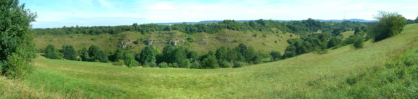 Panaoramabild des Kochhardgraben vom 10. August 2008; Naturschutzgebiet „Kochhartgraben und Ammertalhänge“